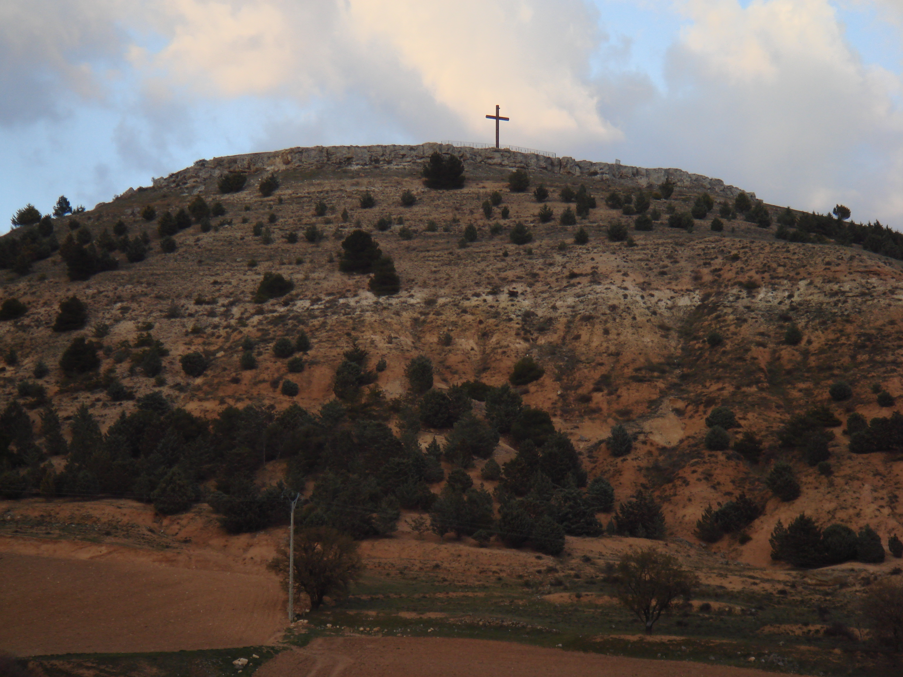 Socastillo, en San Martín de Rubiales (Burgos, España)